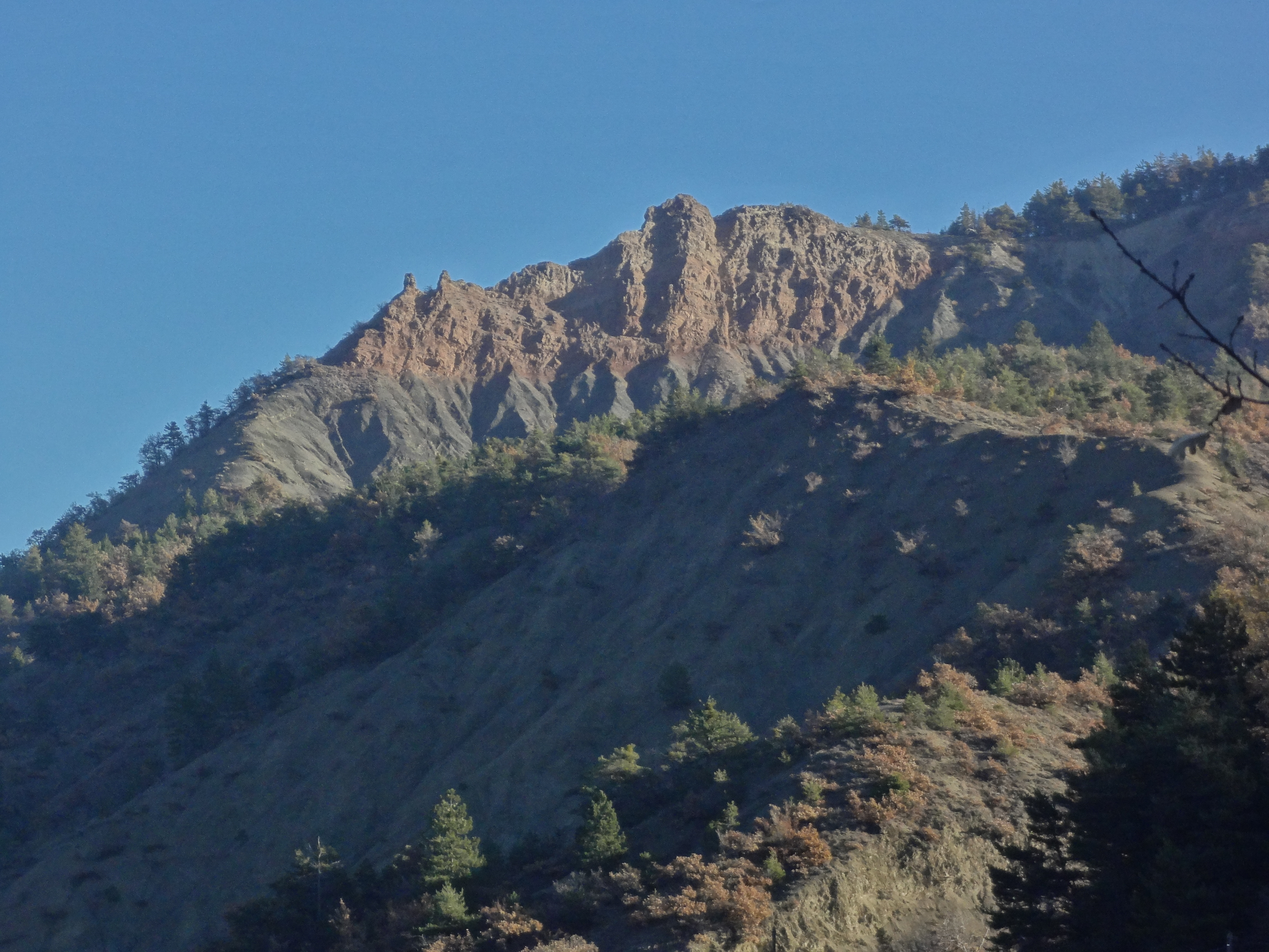 Collet Rouge, sud de la commune, vu des Roches (Claret). 827 m